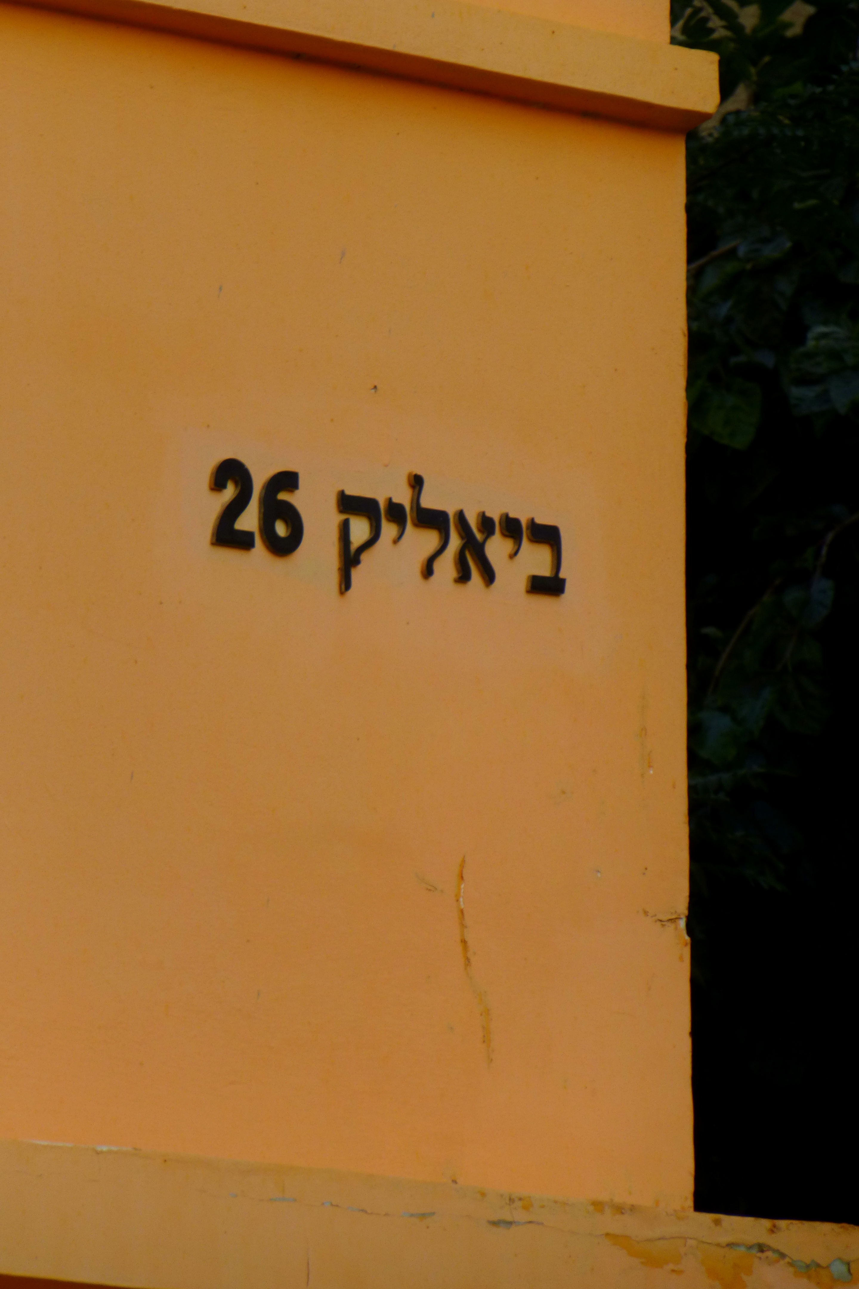 מתחם ביאליק (בית העיר, בית ראובן, מוזיאון הבאוהאוס)